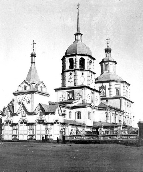 г. Иркутск. Тихвинская церковь построена в 1754-1759.